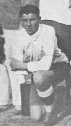 Selección de Uruguay en 1930. Arriba: Álvaro Gestido, José Nasazzi, Enrique Ballestero, Ernesto Mascheroni, José Leandro Andrade y Lorenzo Fernández. Abajo: Pablo Dorado, Héctor Scarone, Héctor Castro, José Pedro Cea e Victoriano Santos Iriarte.